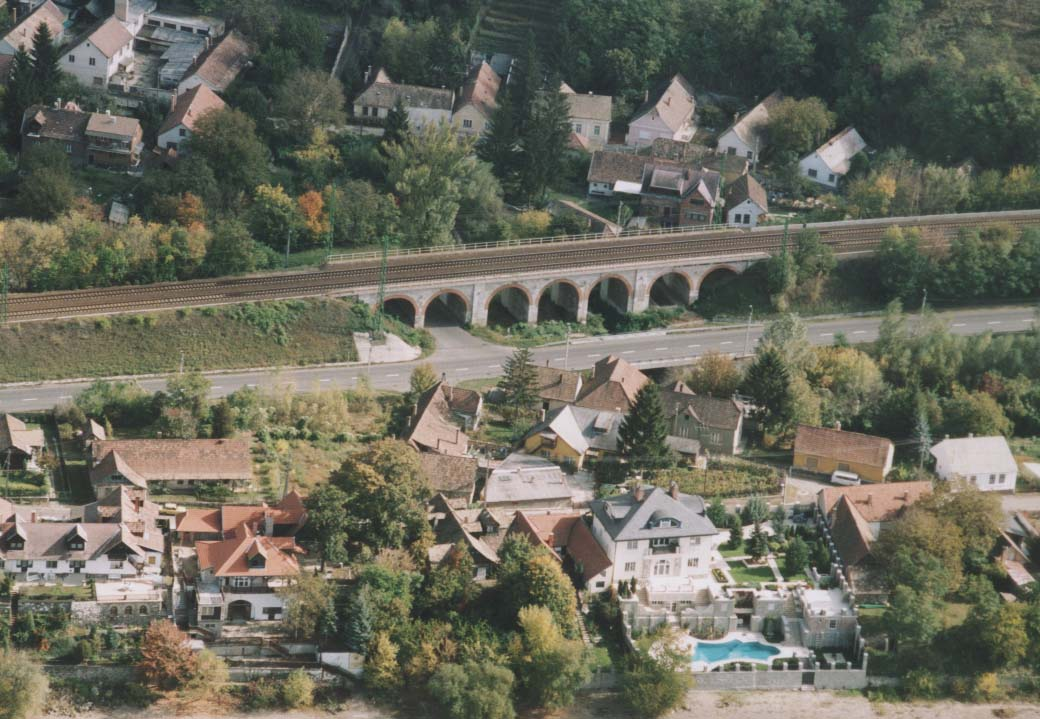 Zabagény, Hungary, aerialphotography